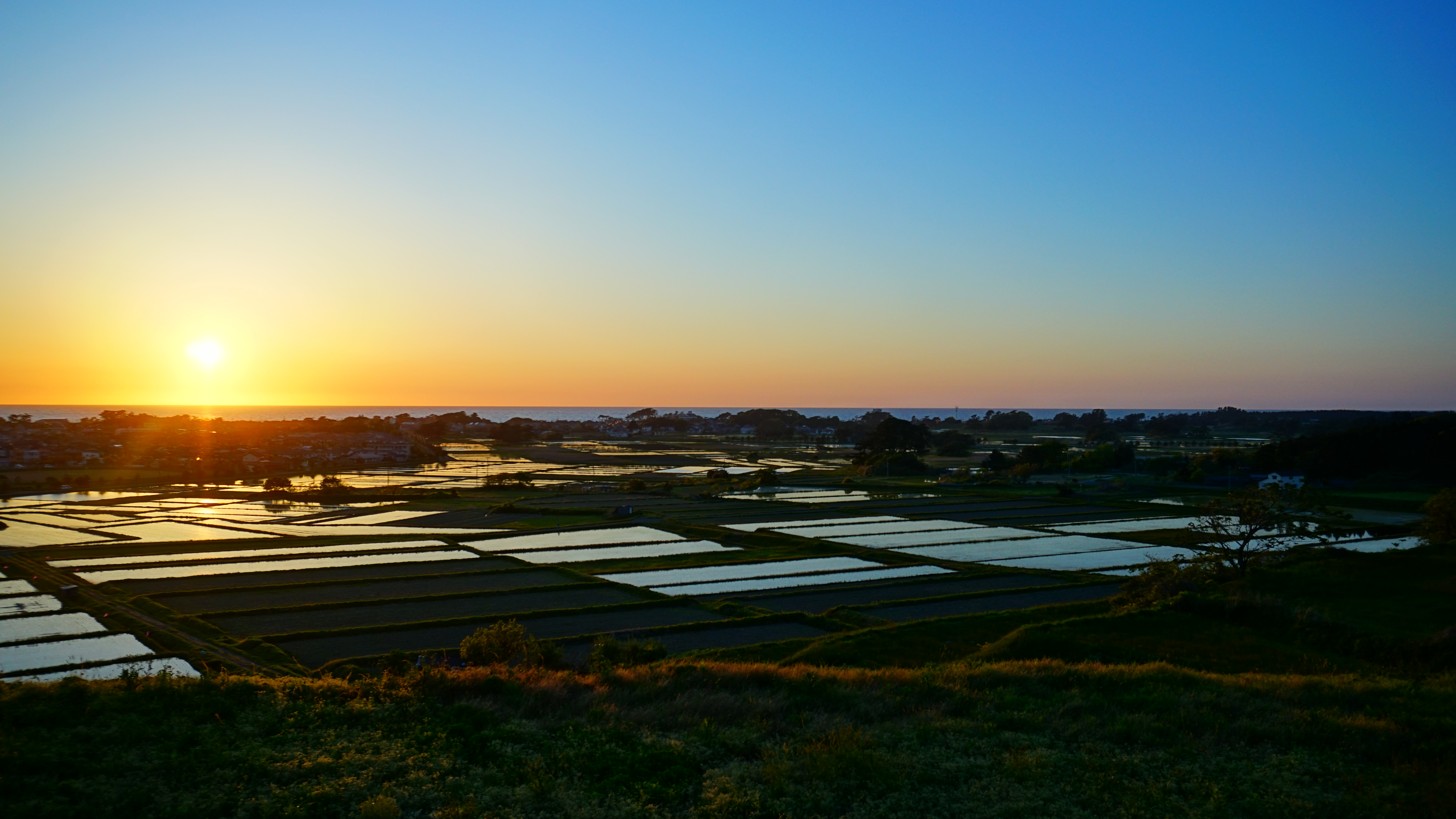 秋田県にかほ市、象潟の夕景。田に水を張ったこの時期は、多島海を思わせる水鏡が現れる。